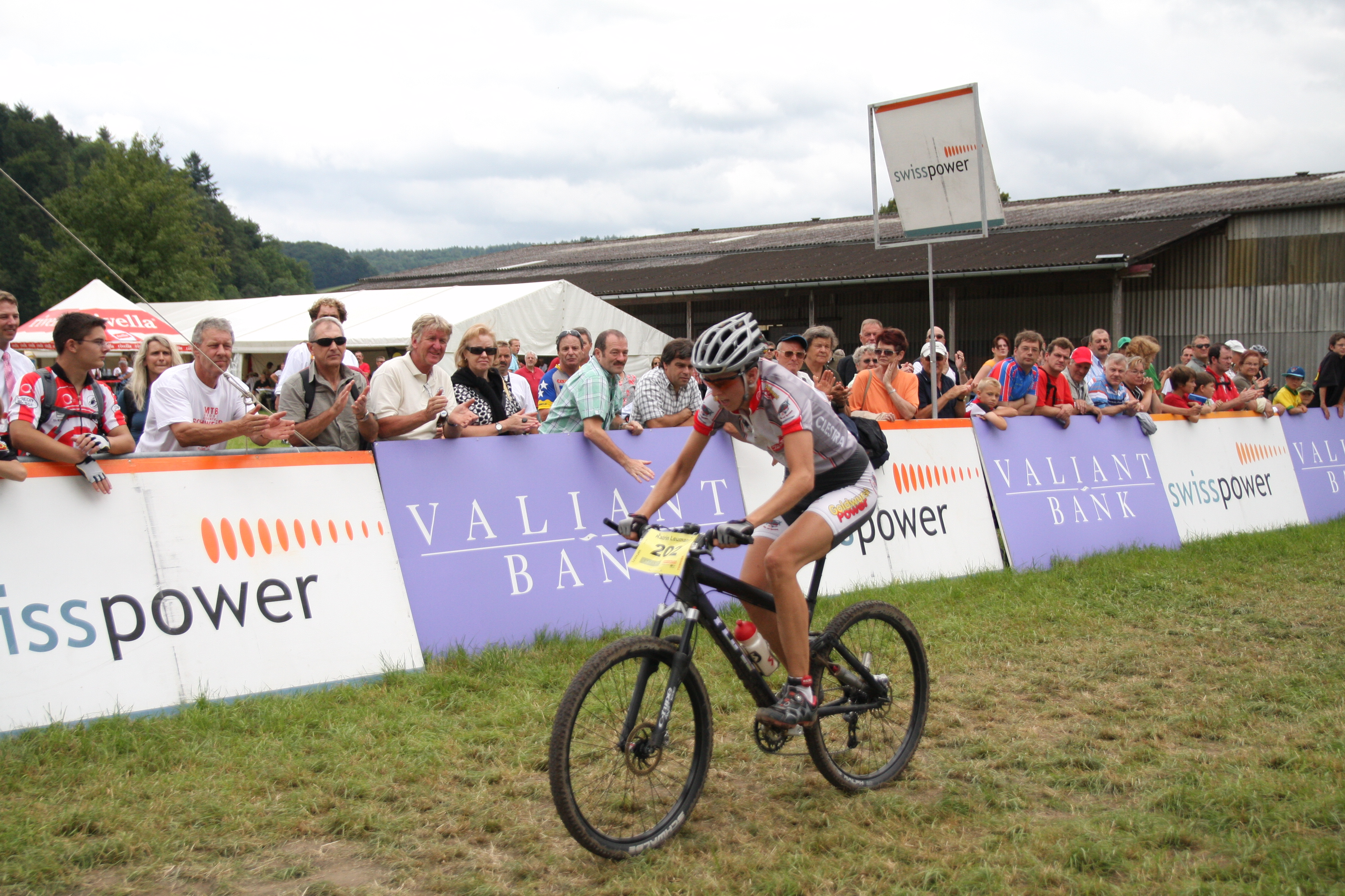 Die Siegerin bei der Elite, Katrin Leumann.